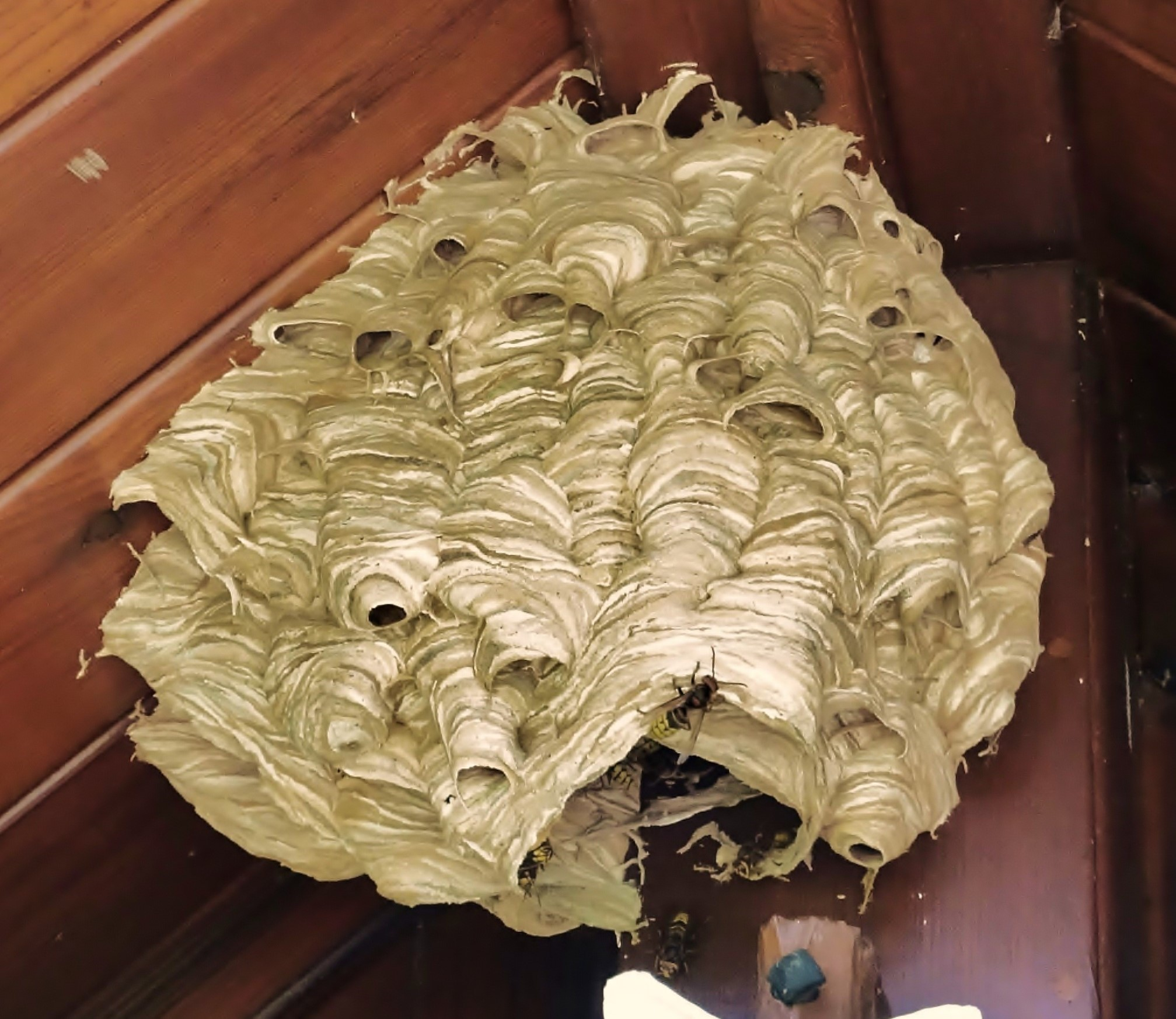 Hornissennest unter dem Dach eines Wegkreuzes